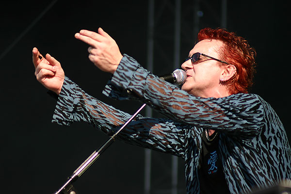 Wayne Hussey, Sänger von The Mission. Konzertfoto vom Mera Luna 2004.